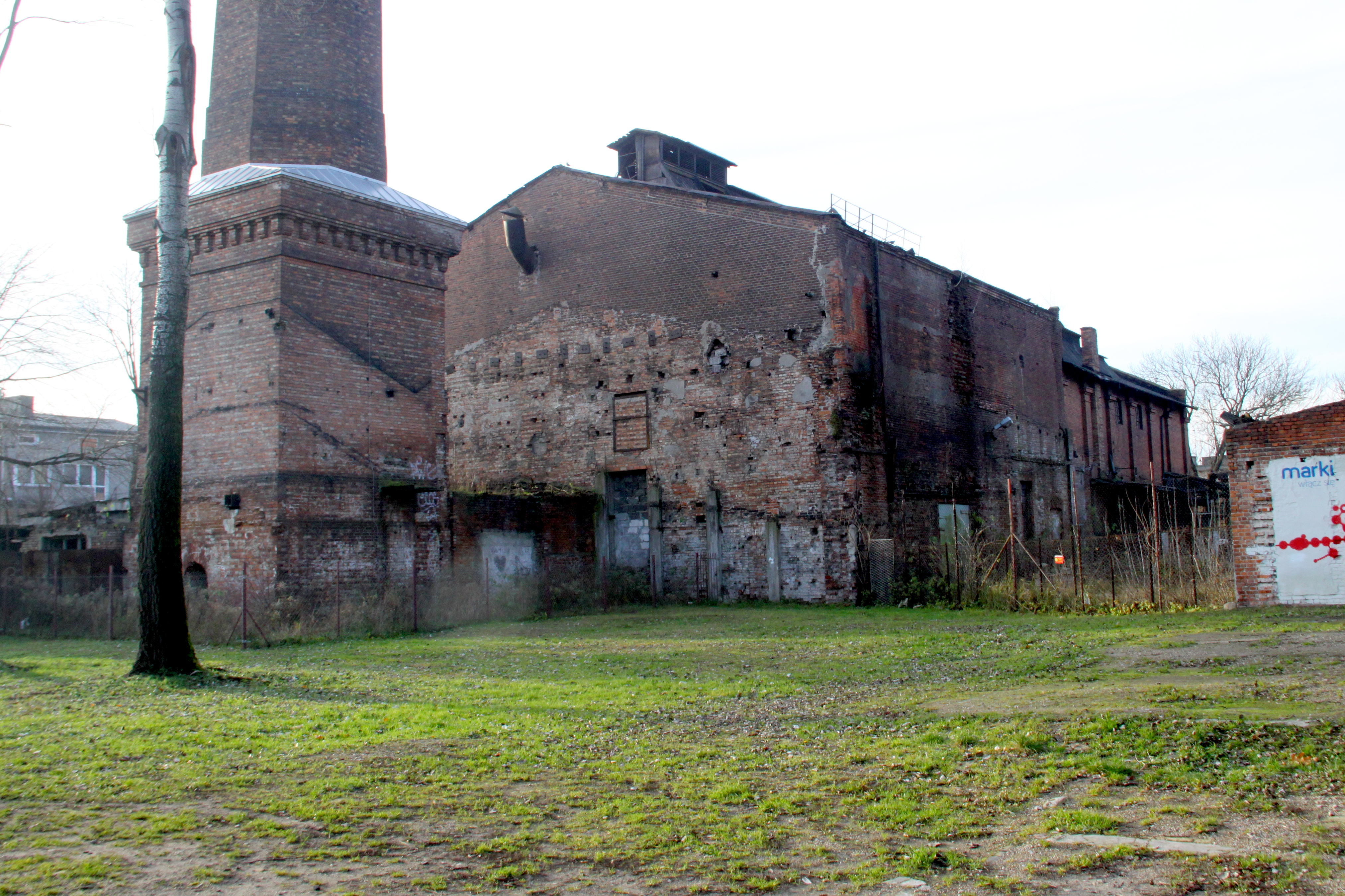 Fabryka braci Briggsów w Markach, w Polsce